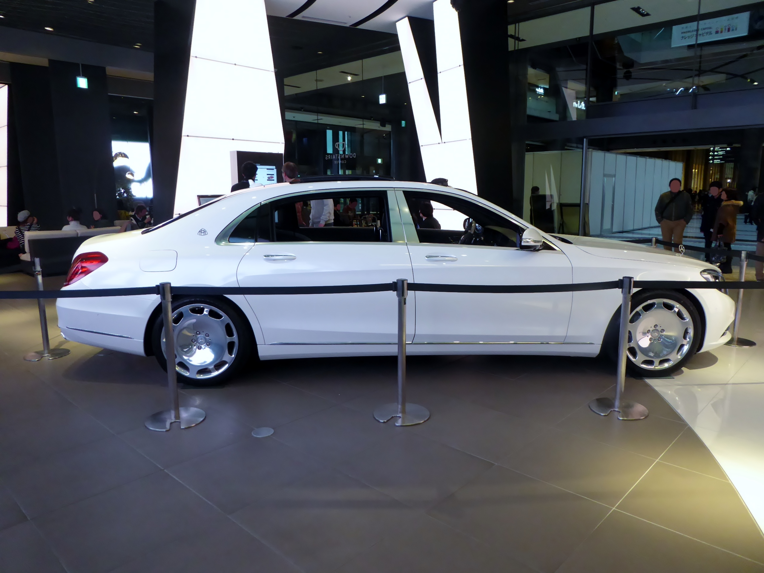 X222型メルセデス・マイバッハS550を右から撮影。